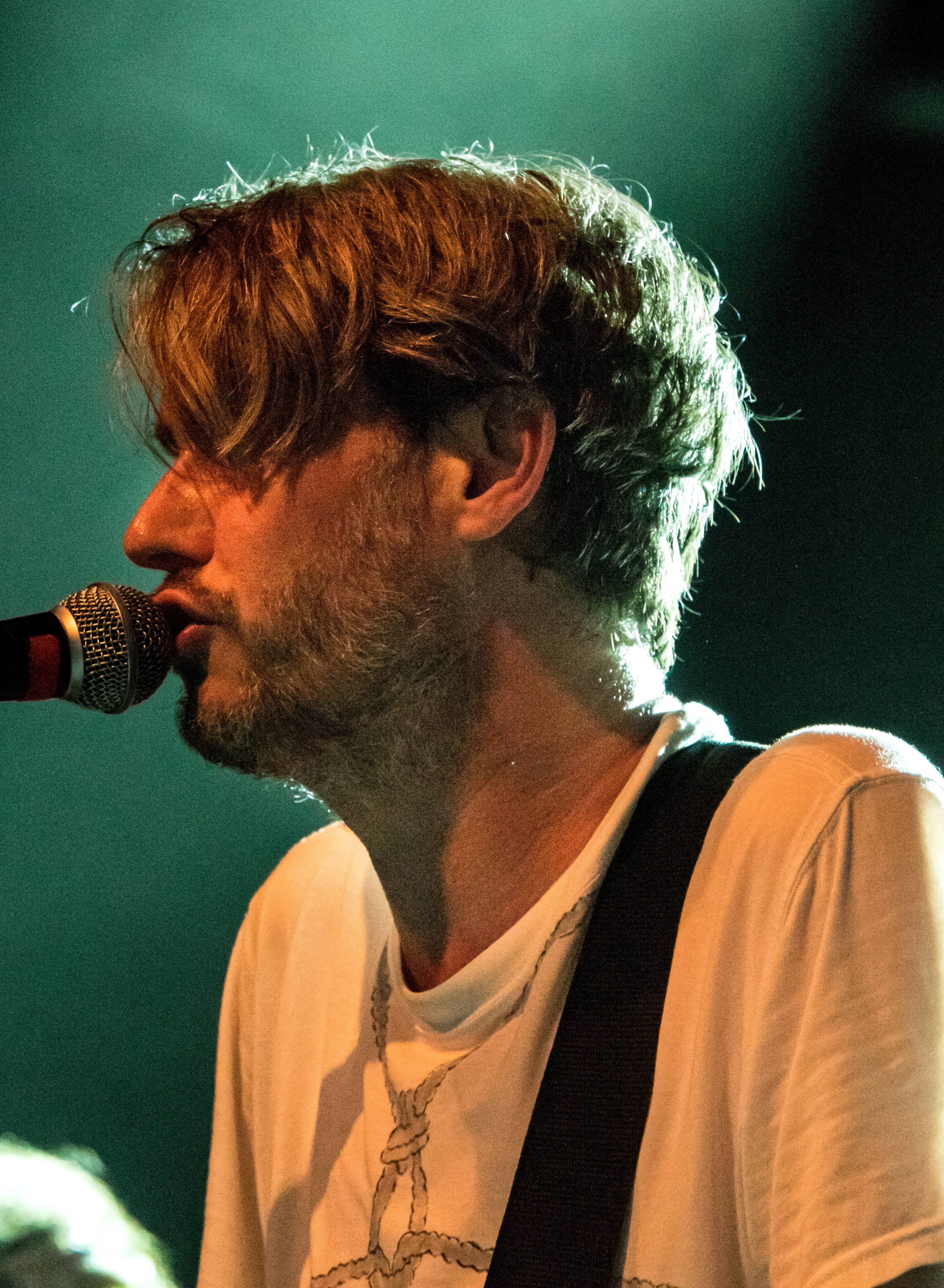 Bilder vom ZMF 2015 Die Rock Band Tocotronic